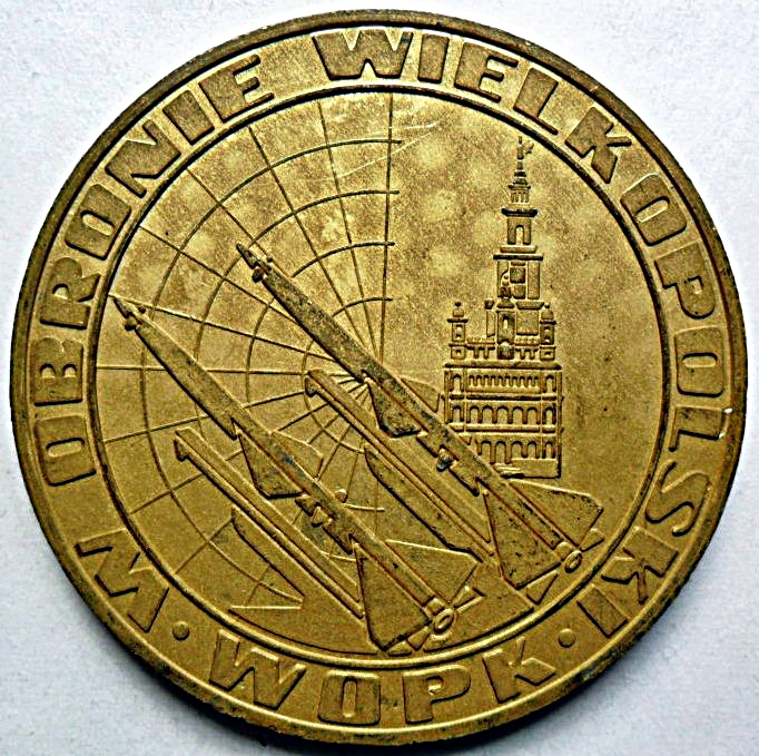 Medal pamiątkowy 79 Pułku Rakietowego Obrony Powietrznej